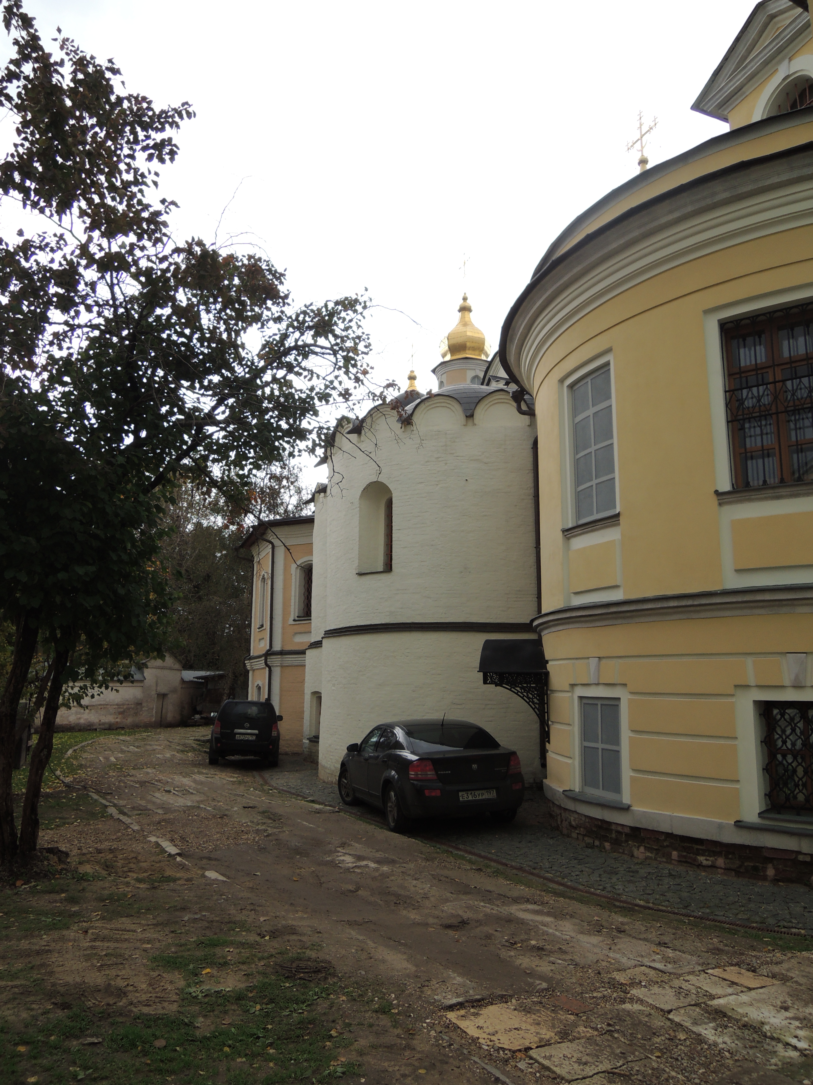 Церковь Антипия на Колымажном дворе